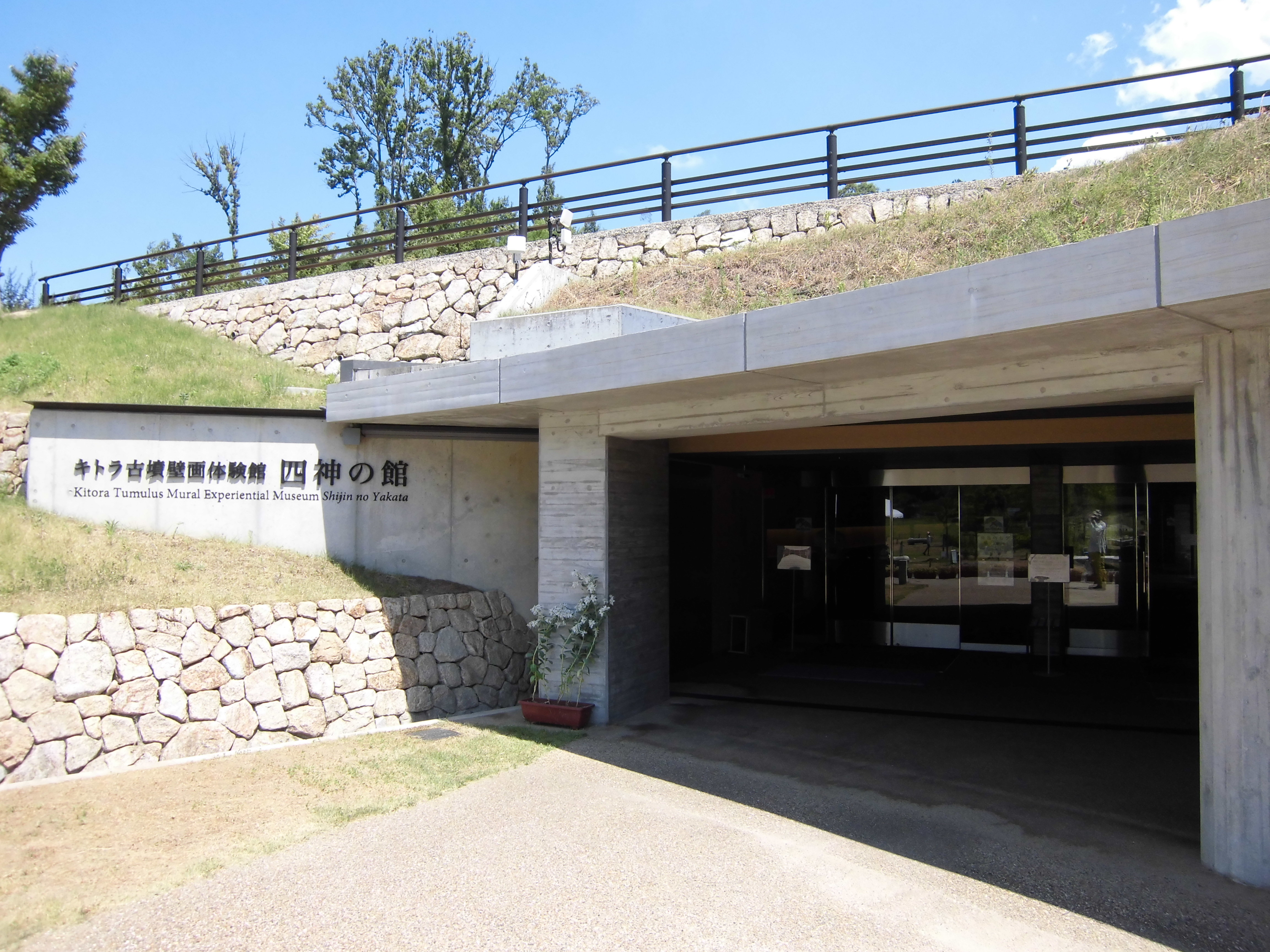 キトラ古墳壁画保存管理施設にあり、壁画や出土品の展示を見学できる。